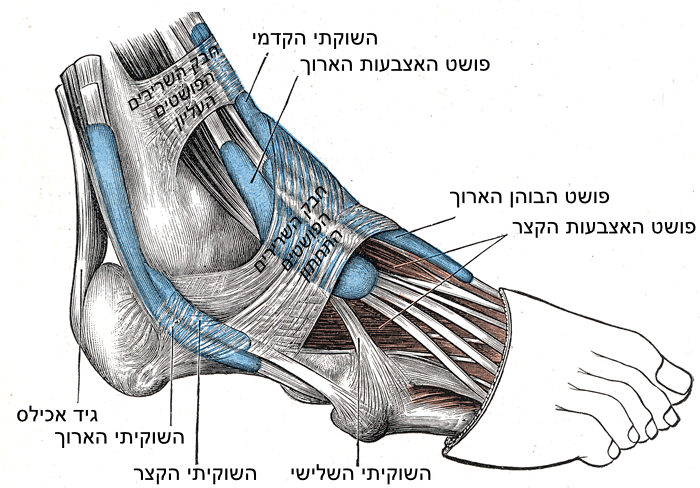 גידים ונרתיקים סינוביאלים בכף רגל ימין במבט צידי